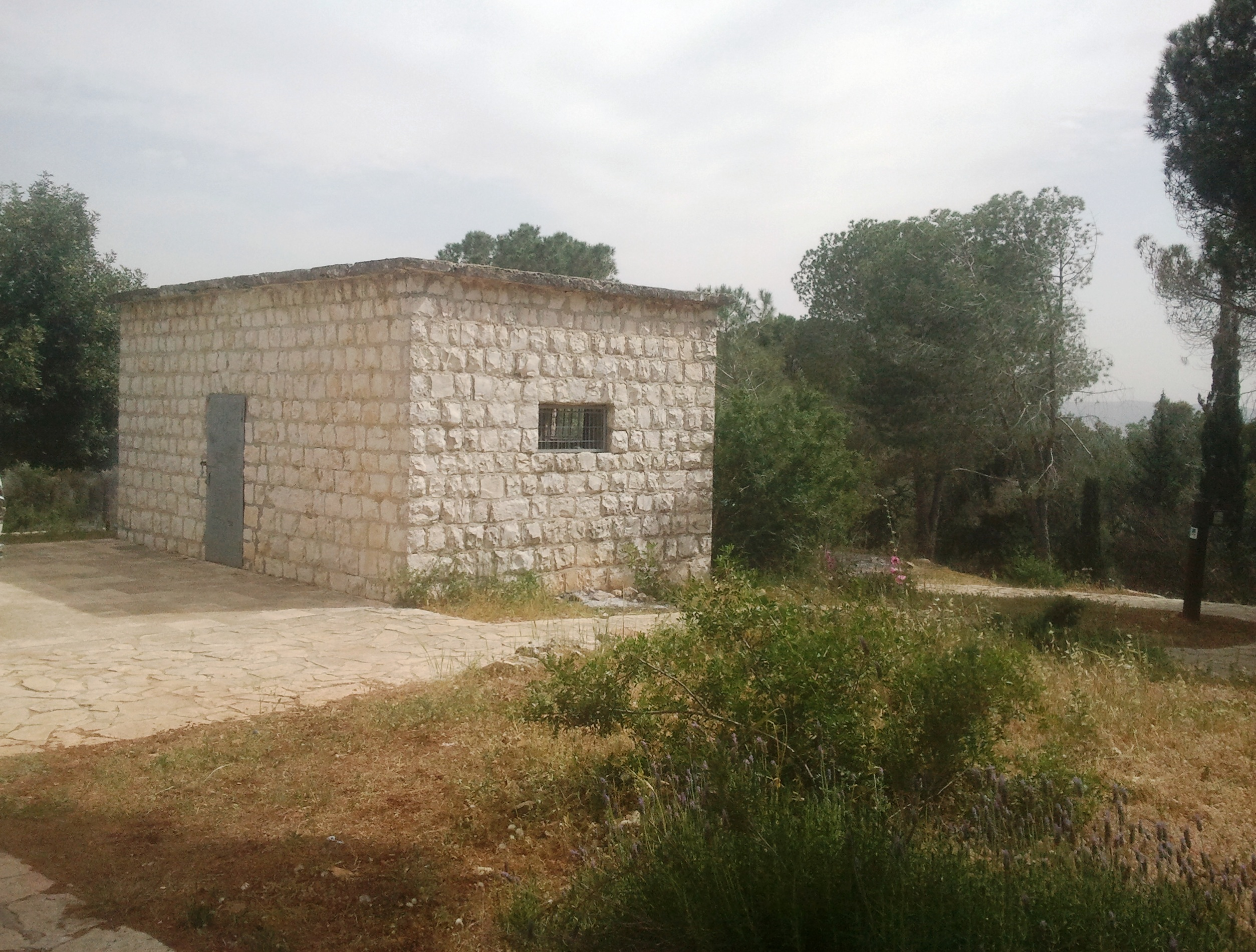 בית היערן הוא מחסן לכלי עבודה ושתילים שנבנה בשנת 1946, לקראת ראשית הנטיעות במורדות המזרחיים של הרי נצרת